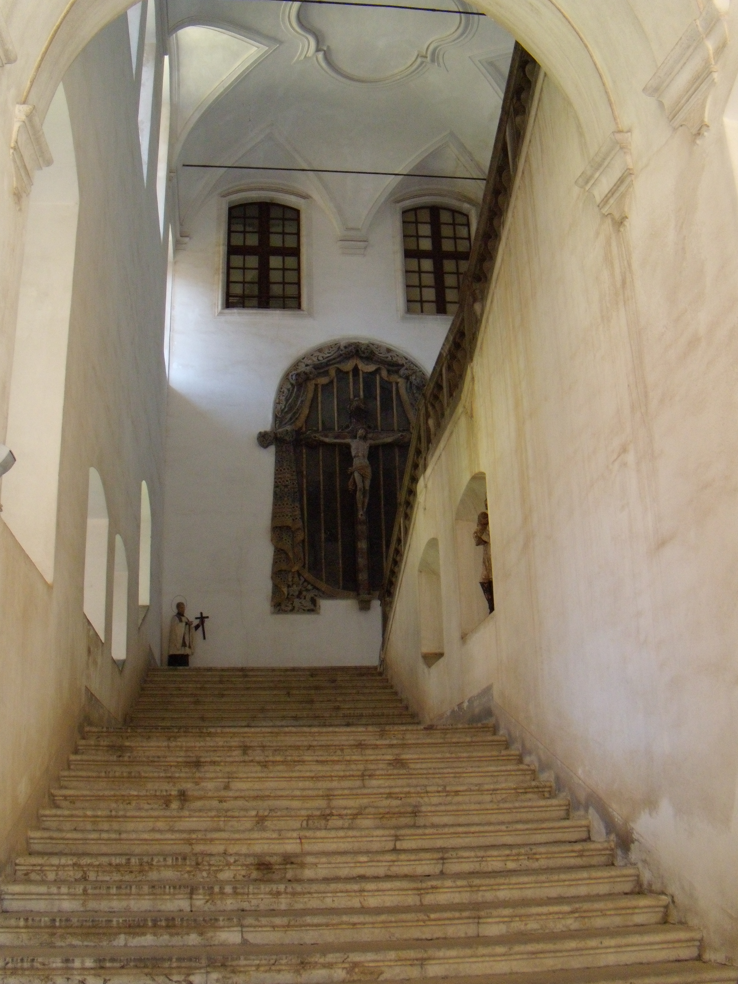 Scala che parte dal primo cortile centrale dell'Albergo delle Povere (Palermo)